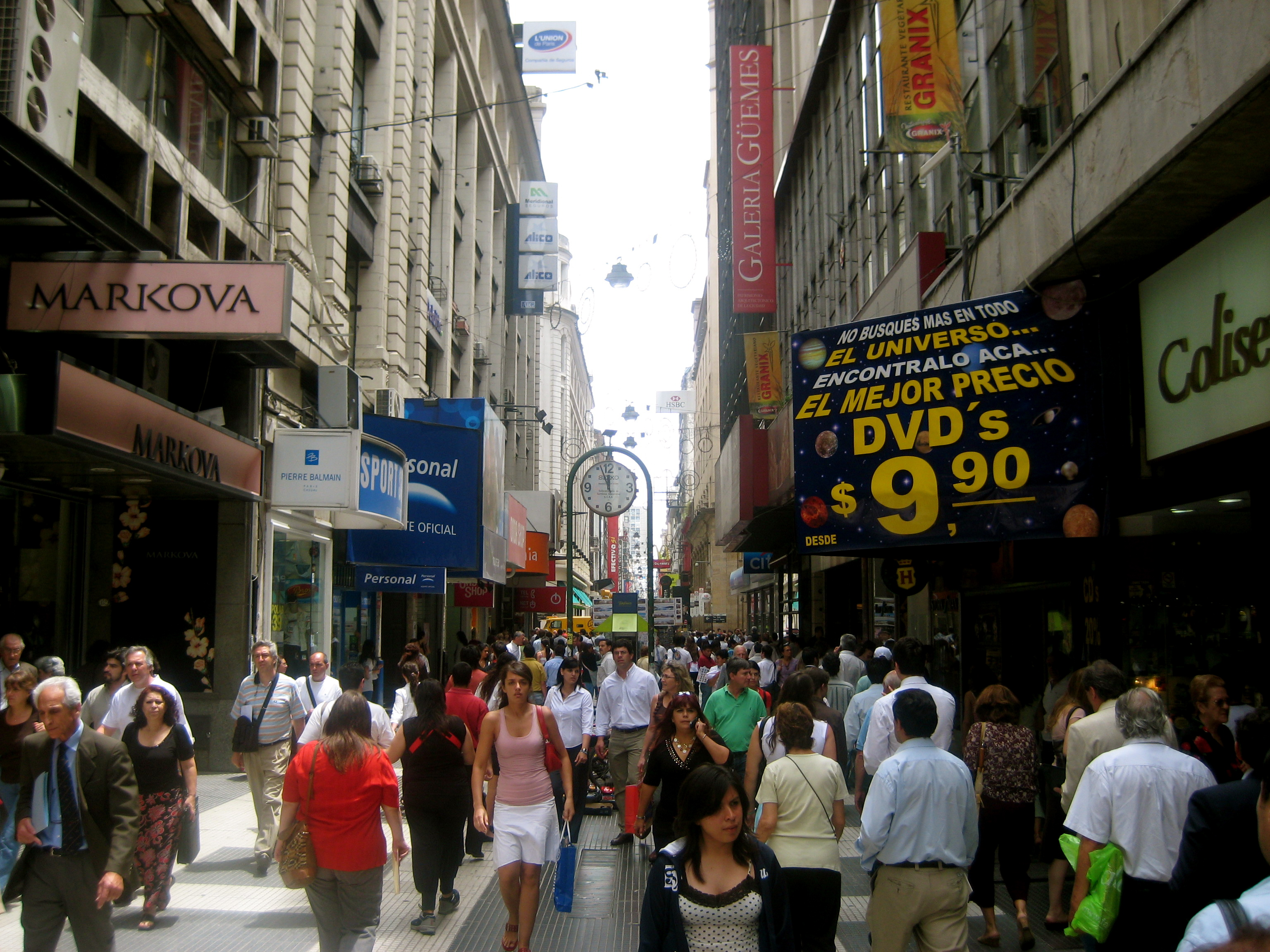 Florida Street, Buenos Aires.